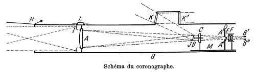 Schéma original du coronographe de Lyot, issu de son article original de 1932 paru dans l'Astronomie, revue de la SAF. Licensing Catégorie:Image de Physique